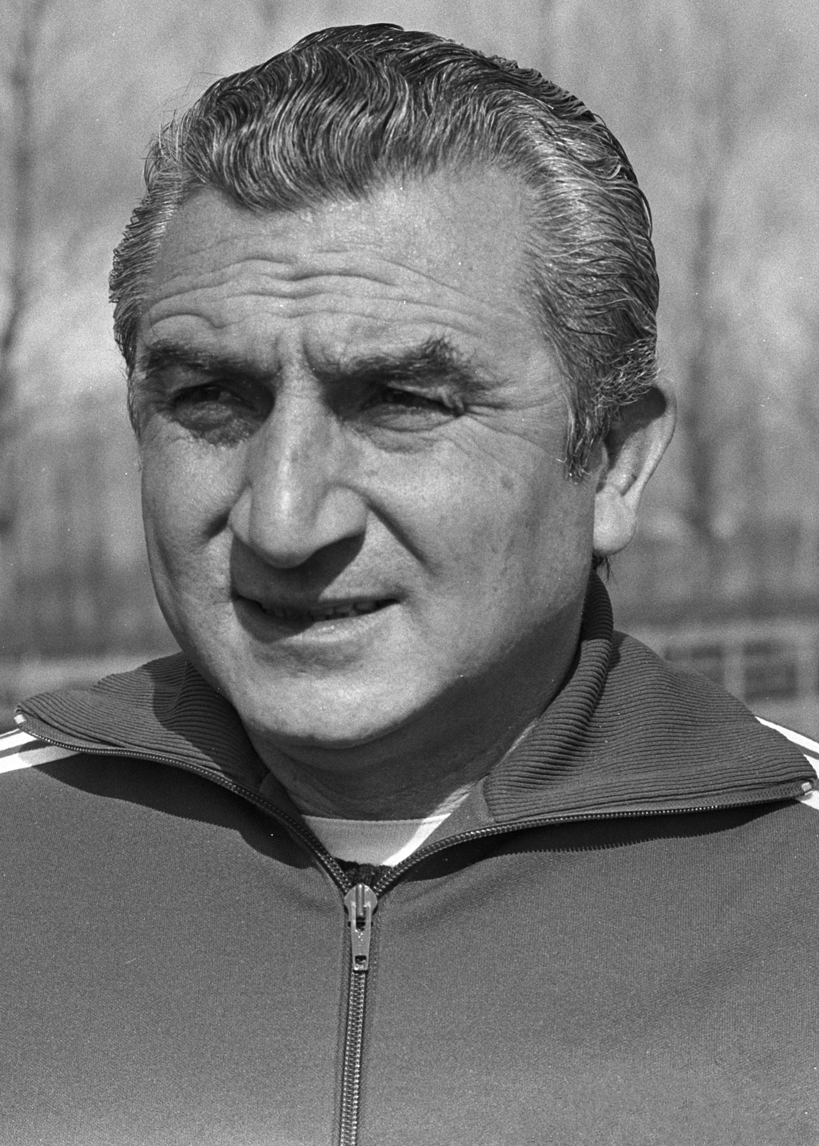 Training Real Madrid in Amsterdam, trainer Munoz (kop).